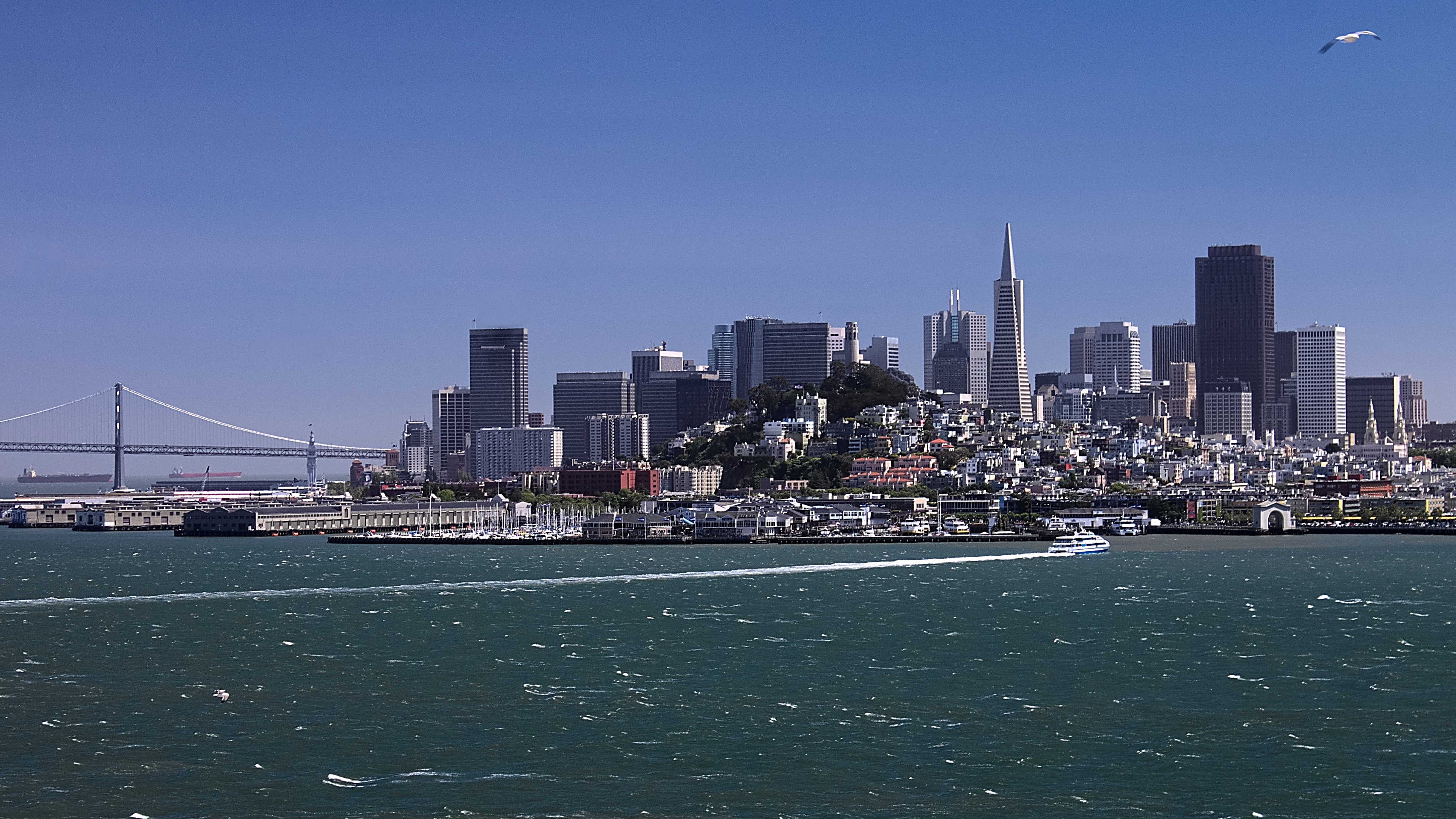 San Francisco est, de par sa tradition de tolérance, souvent à l'avant-garde de l'émancipation des minorités et des droits civiques. La ville fut, dans les années 1960-1970, un foyer important de la contreculture hippie, du psychédélisme et du Flower Power. San Francisco est également emblématique de la cause homosexuelle, notamment dans les années 1970, avec l'activisme politique d'Harvey Milk, assassiné en 1978. Depuis les années 1980, la ville est à la pointe dans le domaine de la mutation écologique et de la lutte contre le changement climatique. Aujourd'hui, la concentration d'entreprises de dimension internationale contribue à attirer des chercheurs du monde entier.